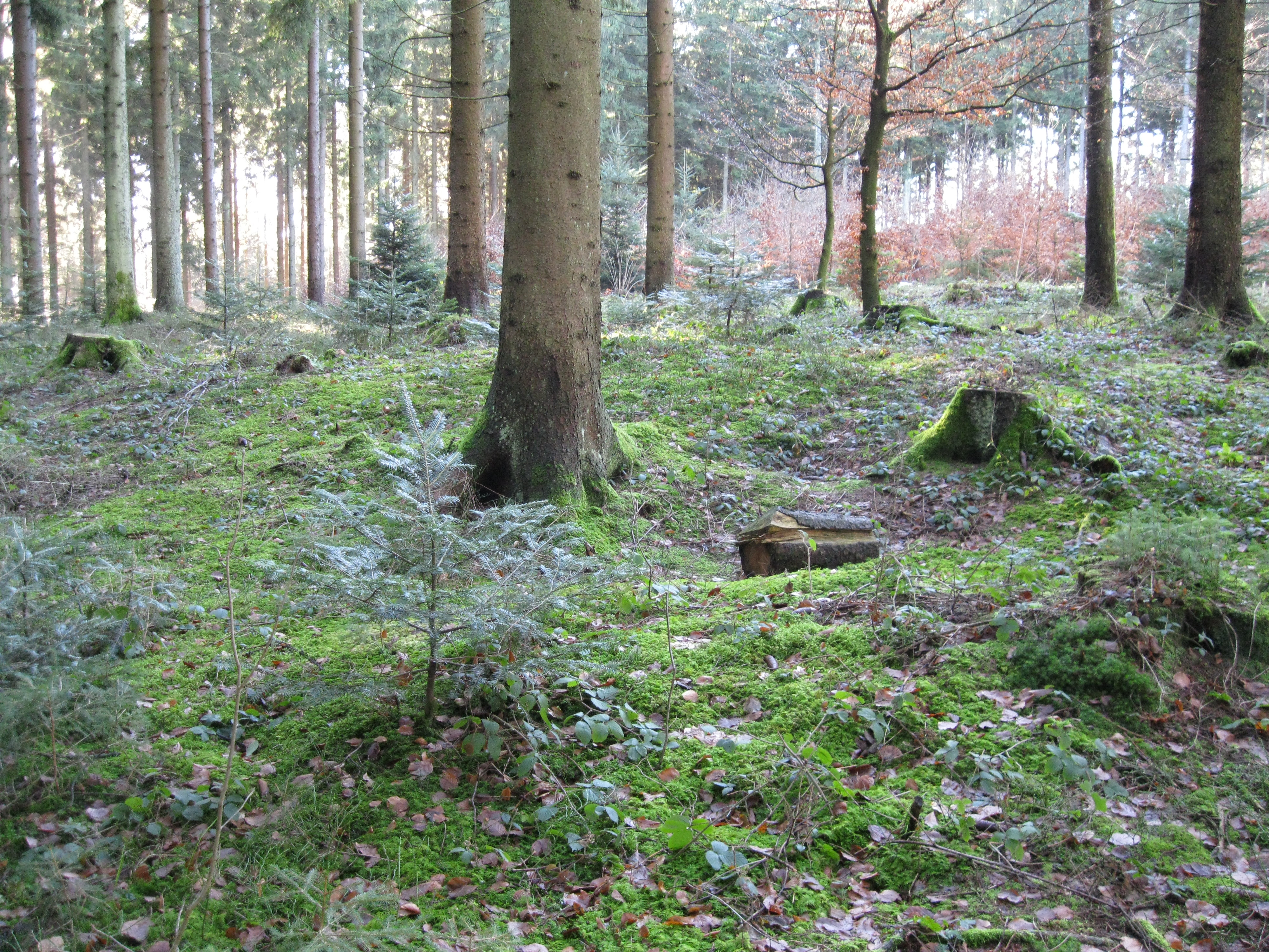 Standort des Kleinkastells Ebnisee. Schuttmauer im Wald erkennbar.